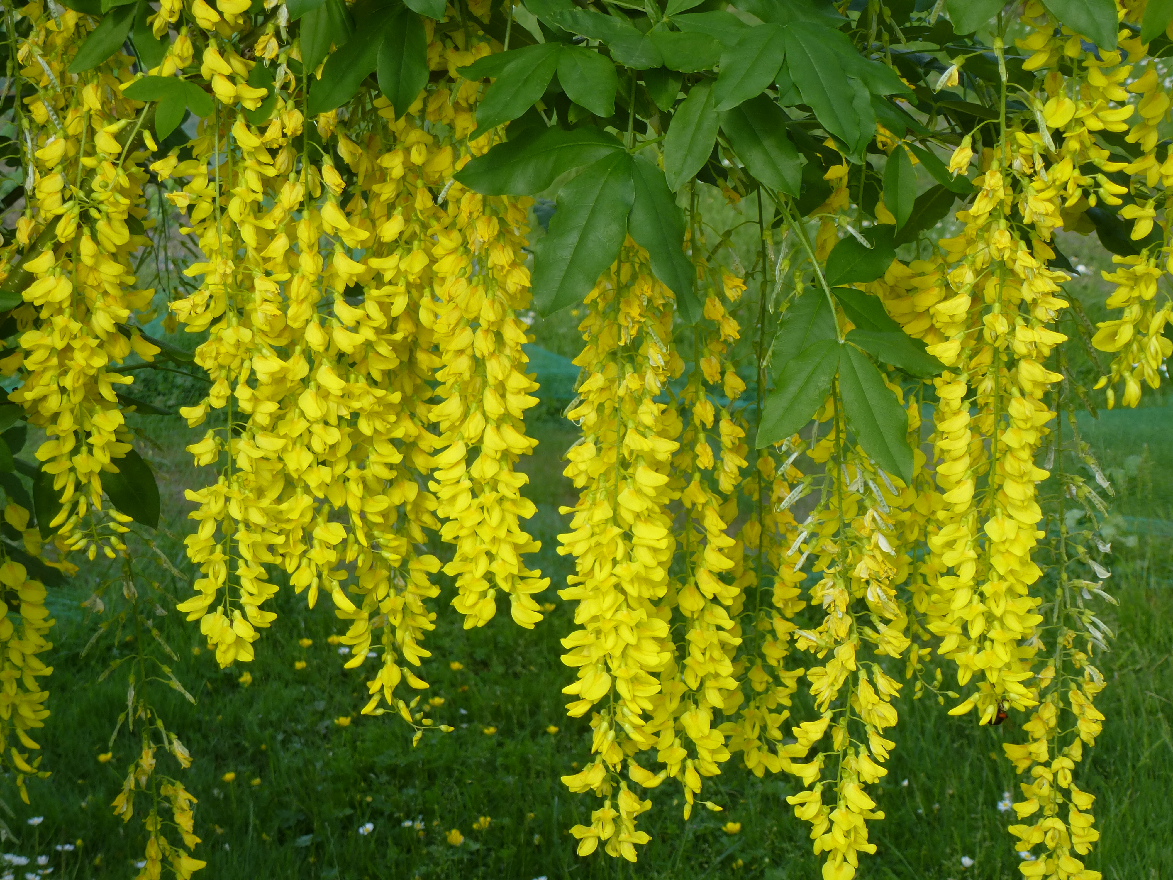 Laburnum x watereri au Jardin des plantes. Muséum national d'Histoire naturelle. 75005 Paris, Ile de France, France.